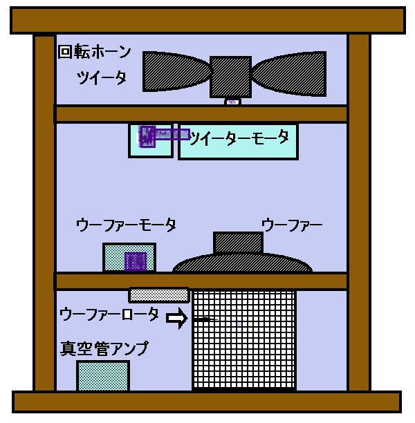 inside of leslie speaker